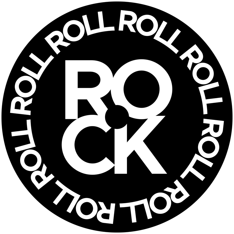 Logo festivalu Rock iN Roll